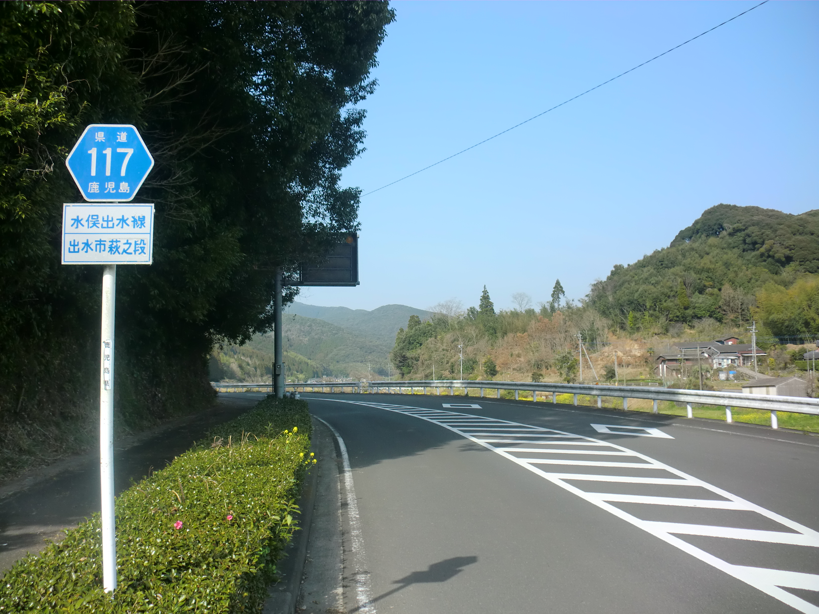 熊本県道・鹿児島県道117号水俣出水線。出水市で撮影。（終点部分）